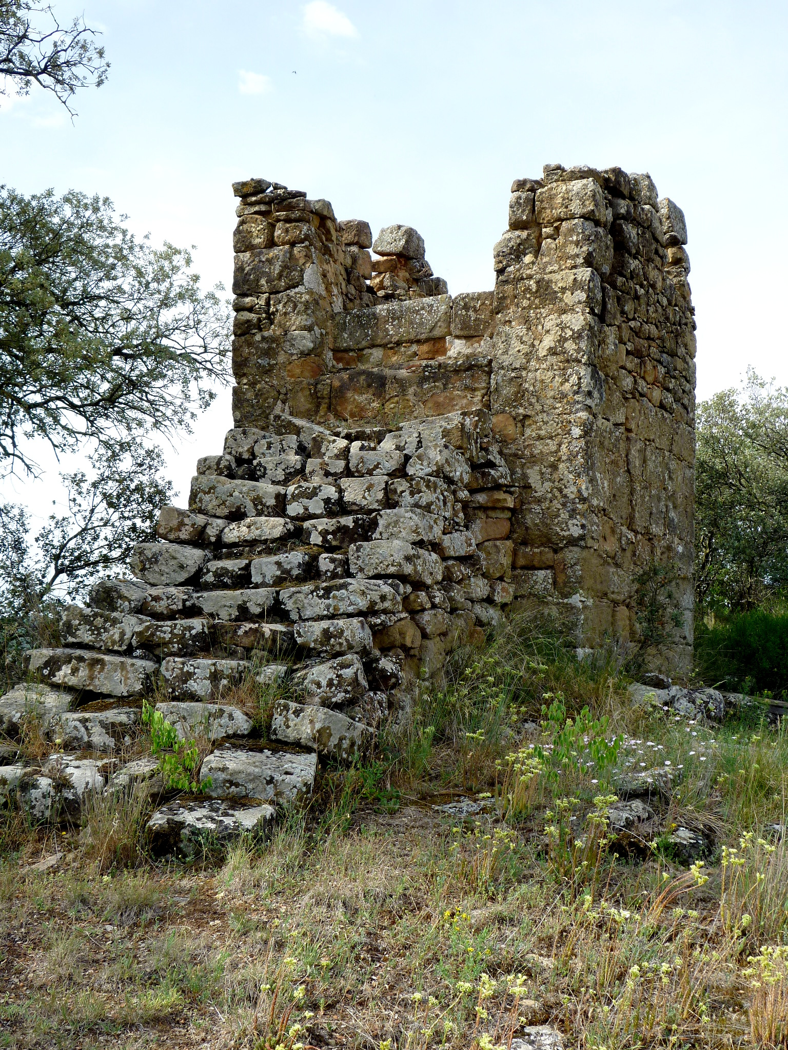 Mas Pujol de les Cases de la Serra (Torrefeta i Florejacs): el cup de vi